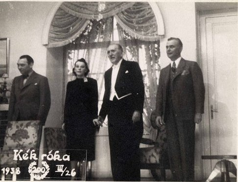 Herczeg Ferenc: Kék róka. Társulat: Nemzeti Színház. Bemutató: 1937.10.16. Rendező: Németh Antal. Szereplők: Pál professzor: Kiss Ferenc, Cécile: Bajor Gizi, Herczeg Ferenc (író), Sándor: Rajnai Gábor a Kék róka 200. előadásán megköszönik a tapsot.